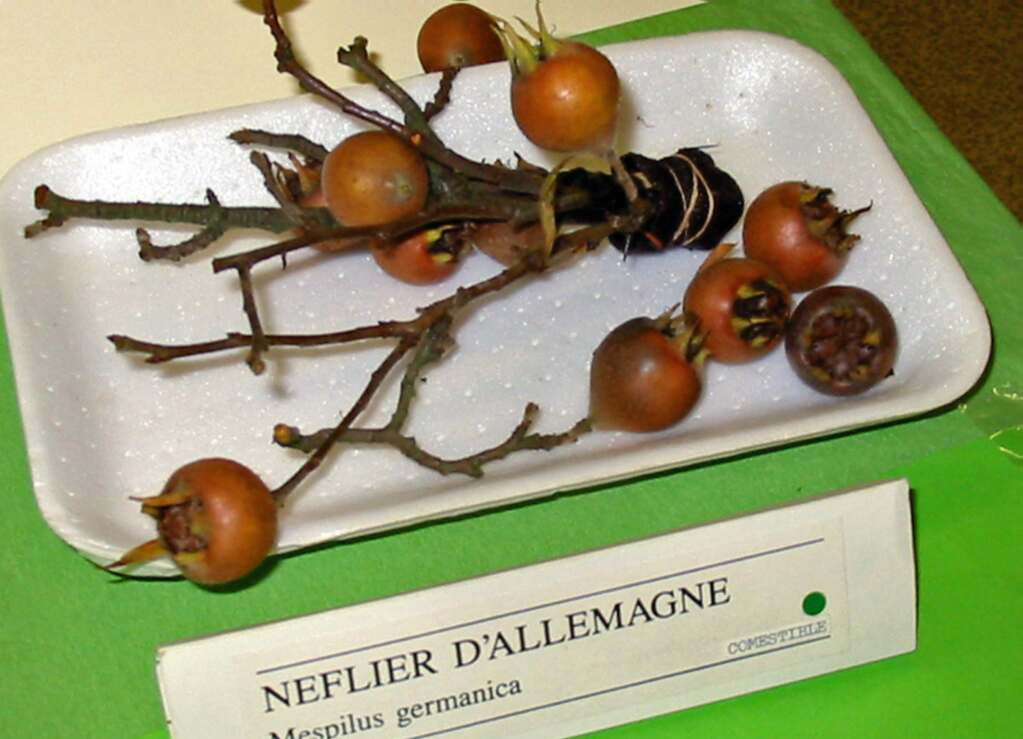 Photo JH Mora ; Stand d'Éric Varlet, 5e forum du livre à Maule (78), 13 /12//2004